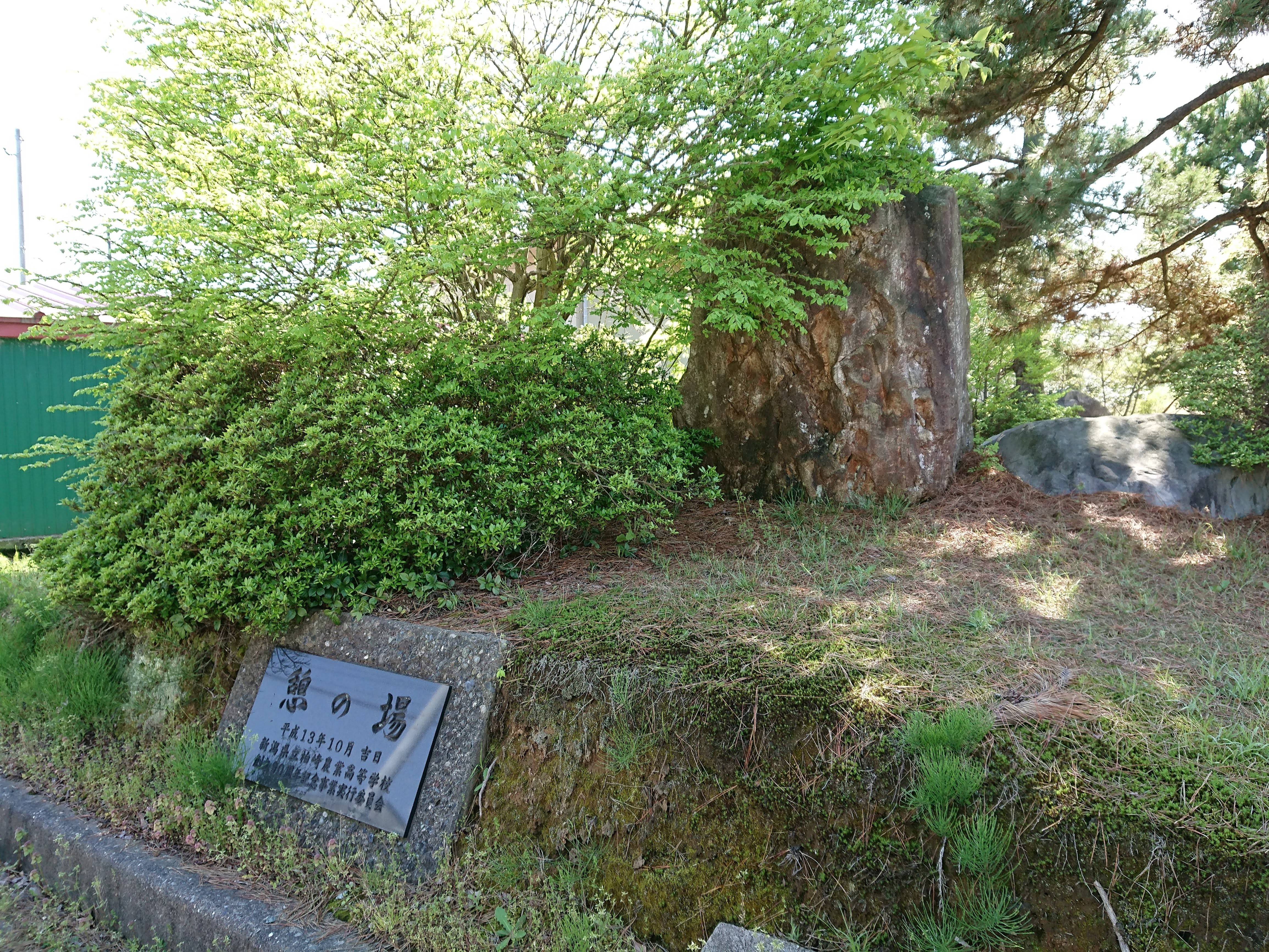 新潟県立柏崎農業高等学校の石碑